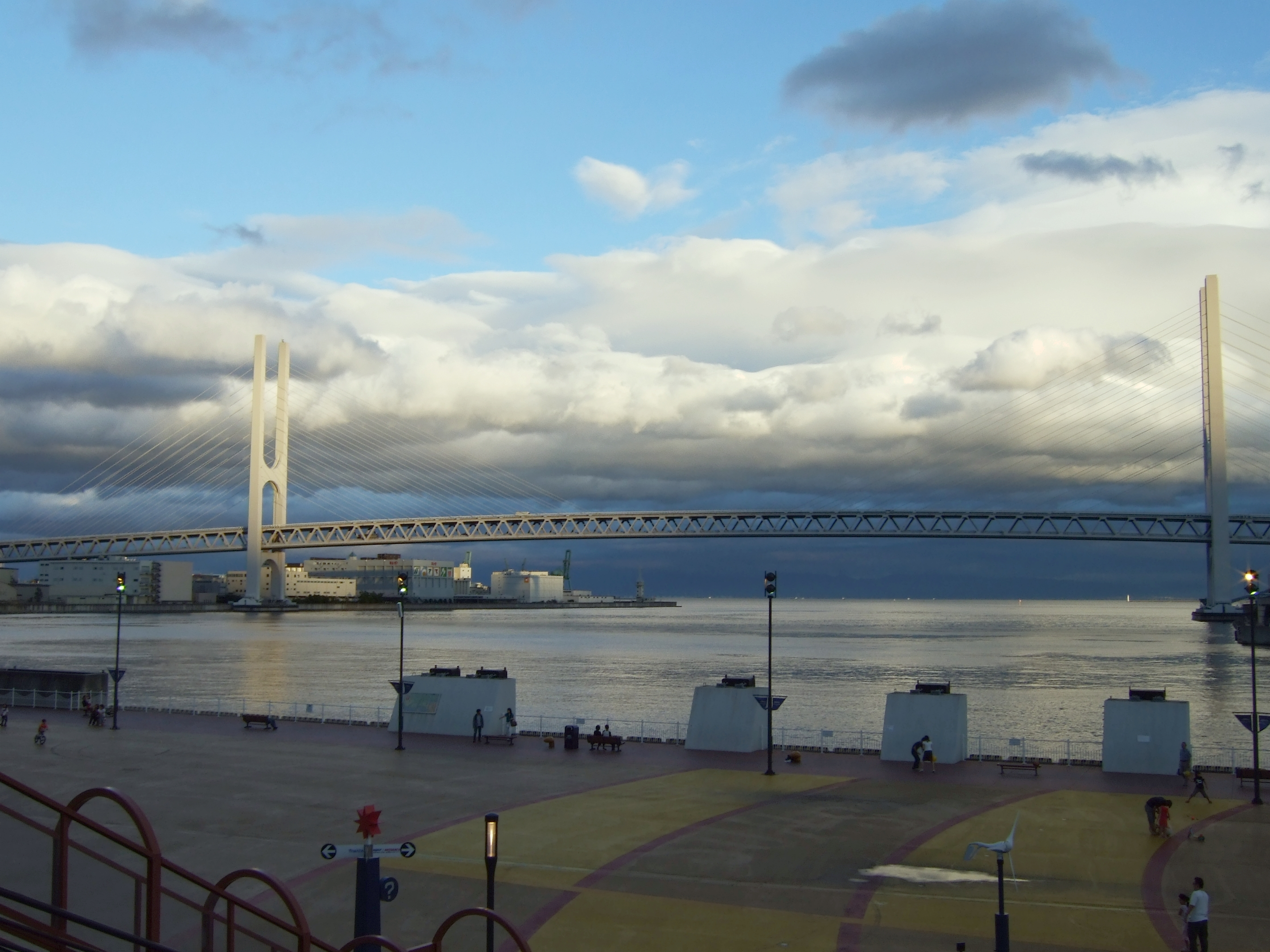 阪神高速道路5号湾岸線 東神戸大橋